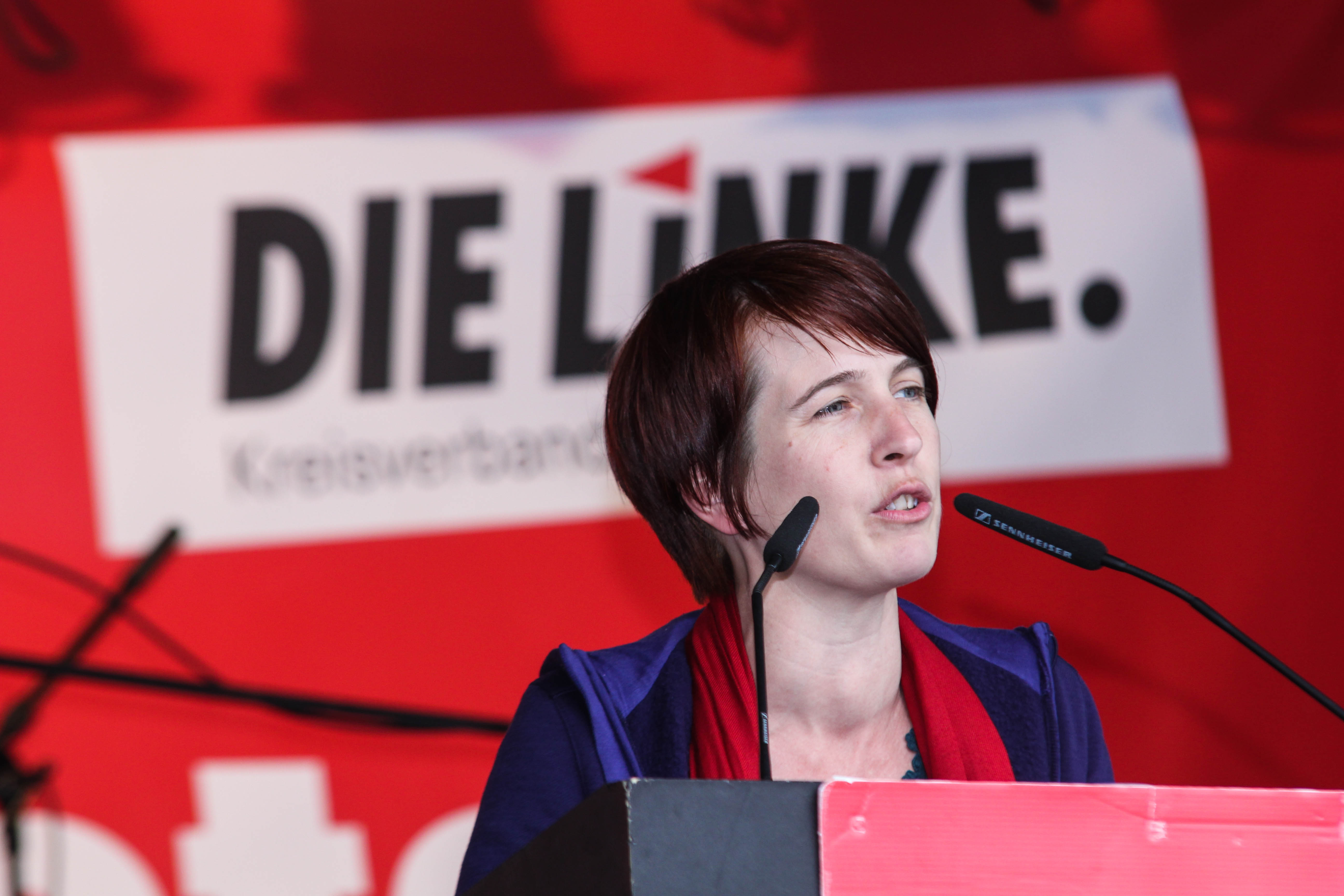 Katharina Schwabedissen am 11. Mai 2012 bei einer Wahlkampfveranstaltung in Duisburg